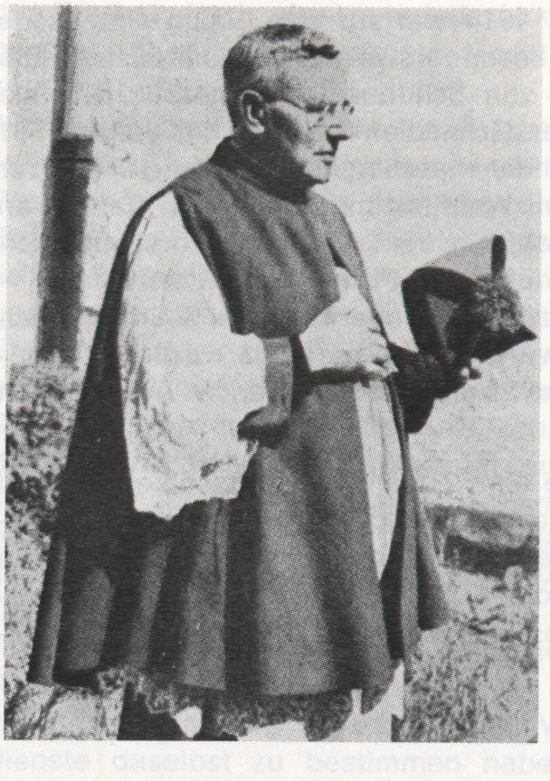 Prälat Karl Foltz, Waldfischbach, Diözese Speyer